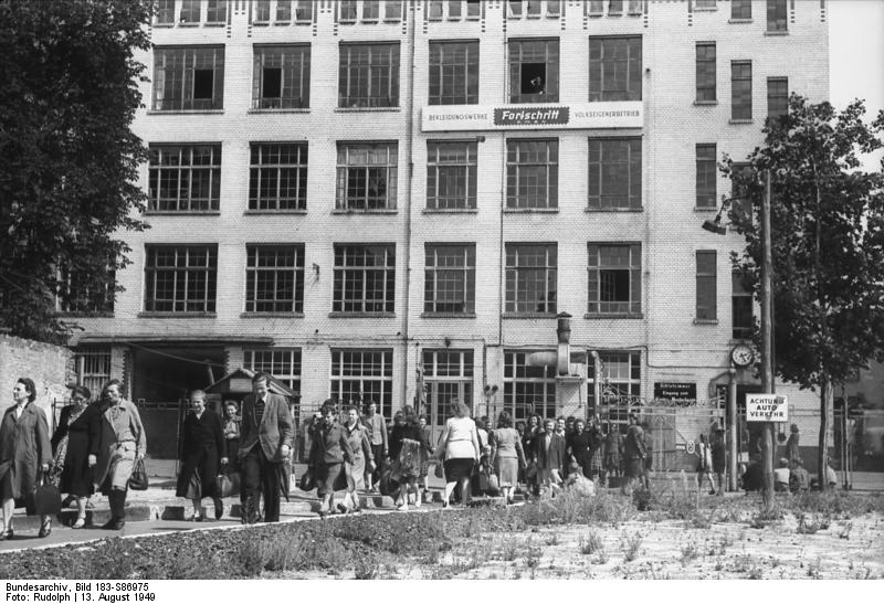 Zentralbild / Illus-Rudoph Berlin, 13.8.1949 Schichtwechsel im Werk I der Bekleidungswerke "Fortschritt" in der Möllendorfstraße.